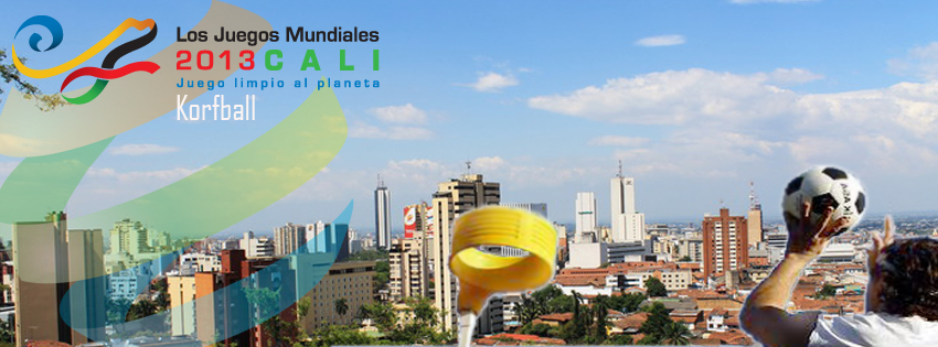 “Deportes de Pelota” de los Juegos Mundiales Cali 2013, en La Sucursal del Cielo